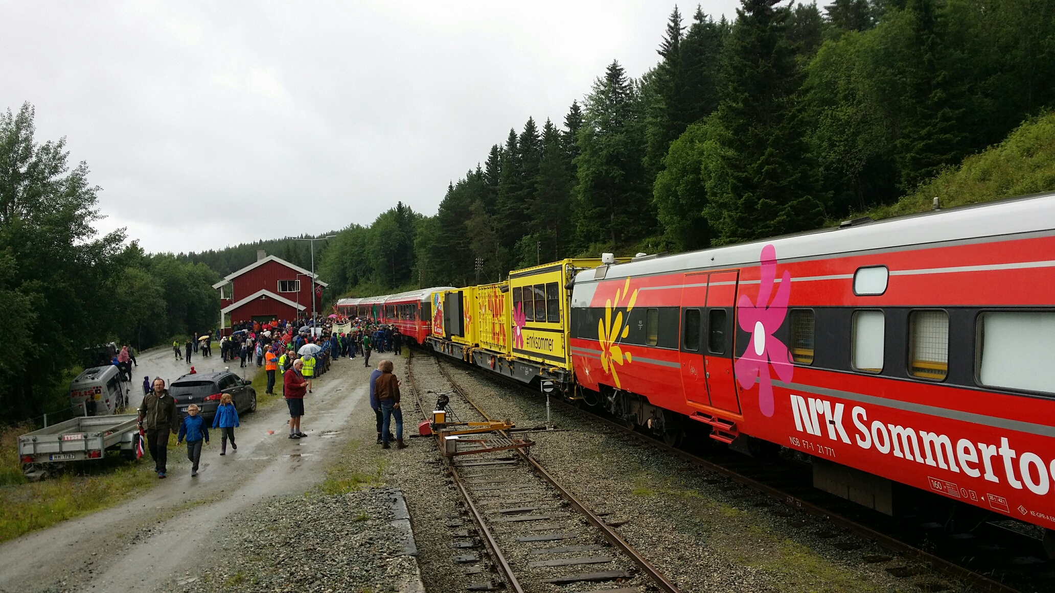 Sommertoget på Haltdalen stasjon 18. juli 2017.